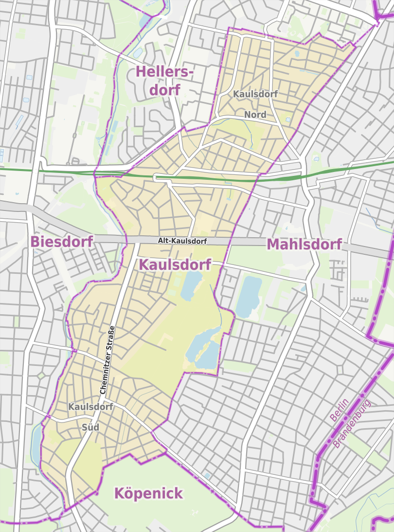 Übersichtskarte der Straßen und Ortslagen in Berlin-Kaulsdorf